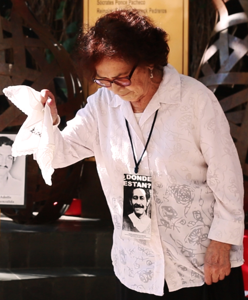 Violeta Zúñiga bailando al Cueca Sola, junto a Sofia Ureta, en un acto que conmemora a los 119 desaparecidos en la Facultad de Derecho de la Universidad de Chile.